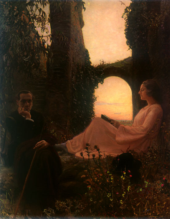 Antonio Machado y su musa, retrato de Antonio Machado (1875 - 1939), en el oleo modernista de Leandro Oroz Lacalle (1883 - 1933).